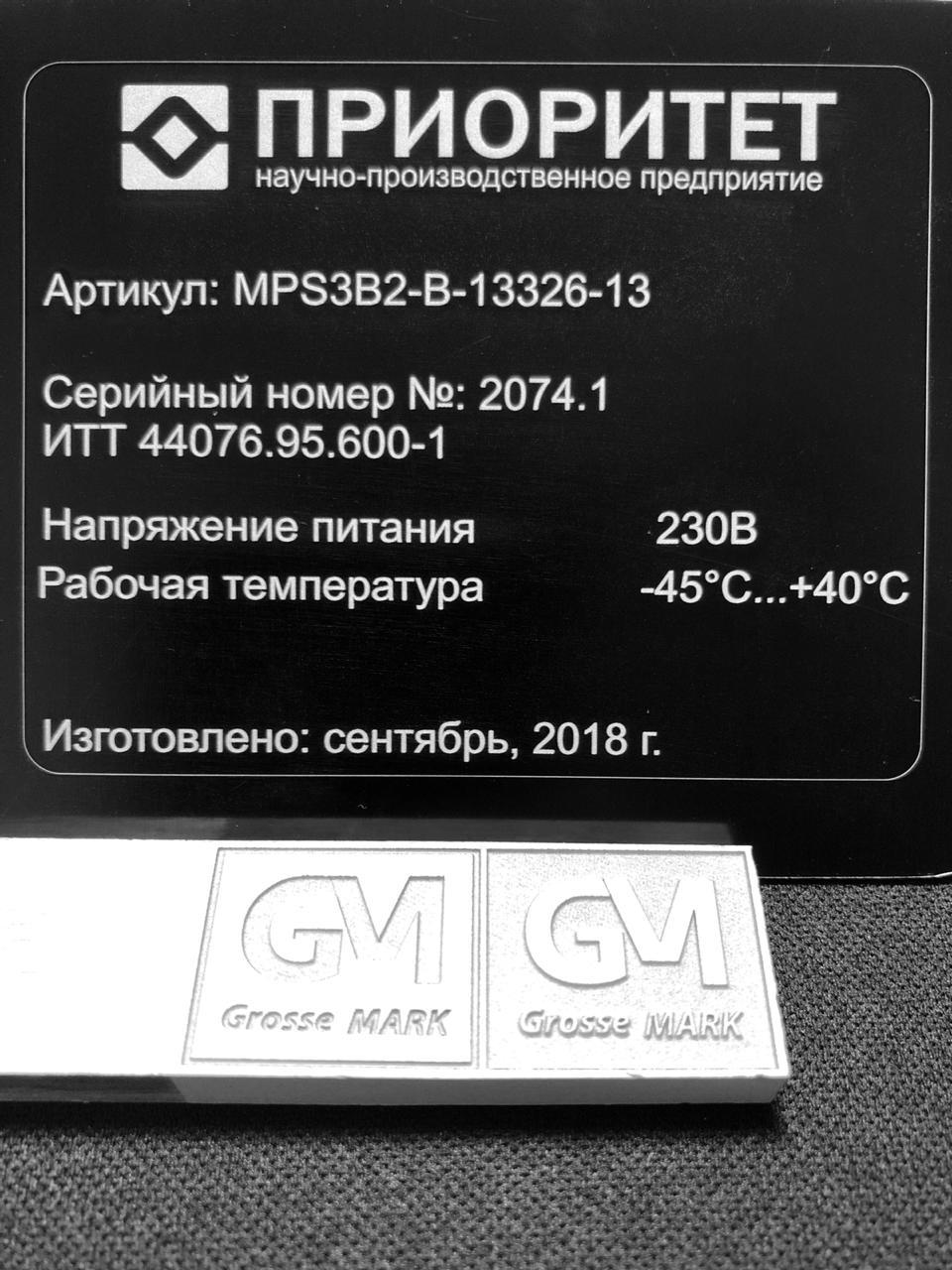 Лазерная гравировка шильдов на оборудование